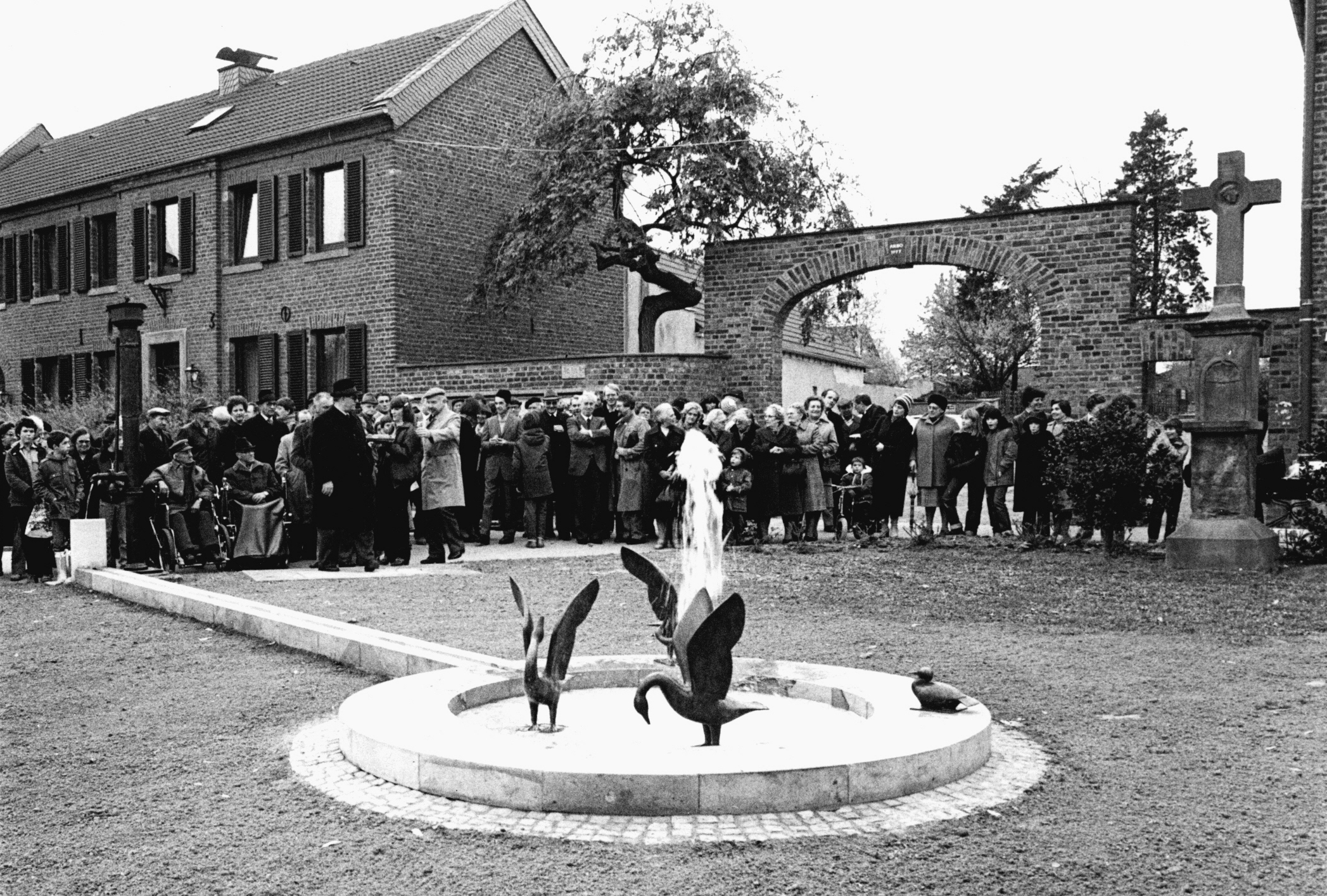 Fontaine de Nörvenich 1981 bronze et pierre, artiste: Jean Vincent de Crozals